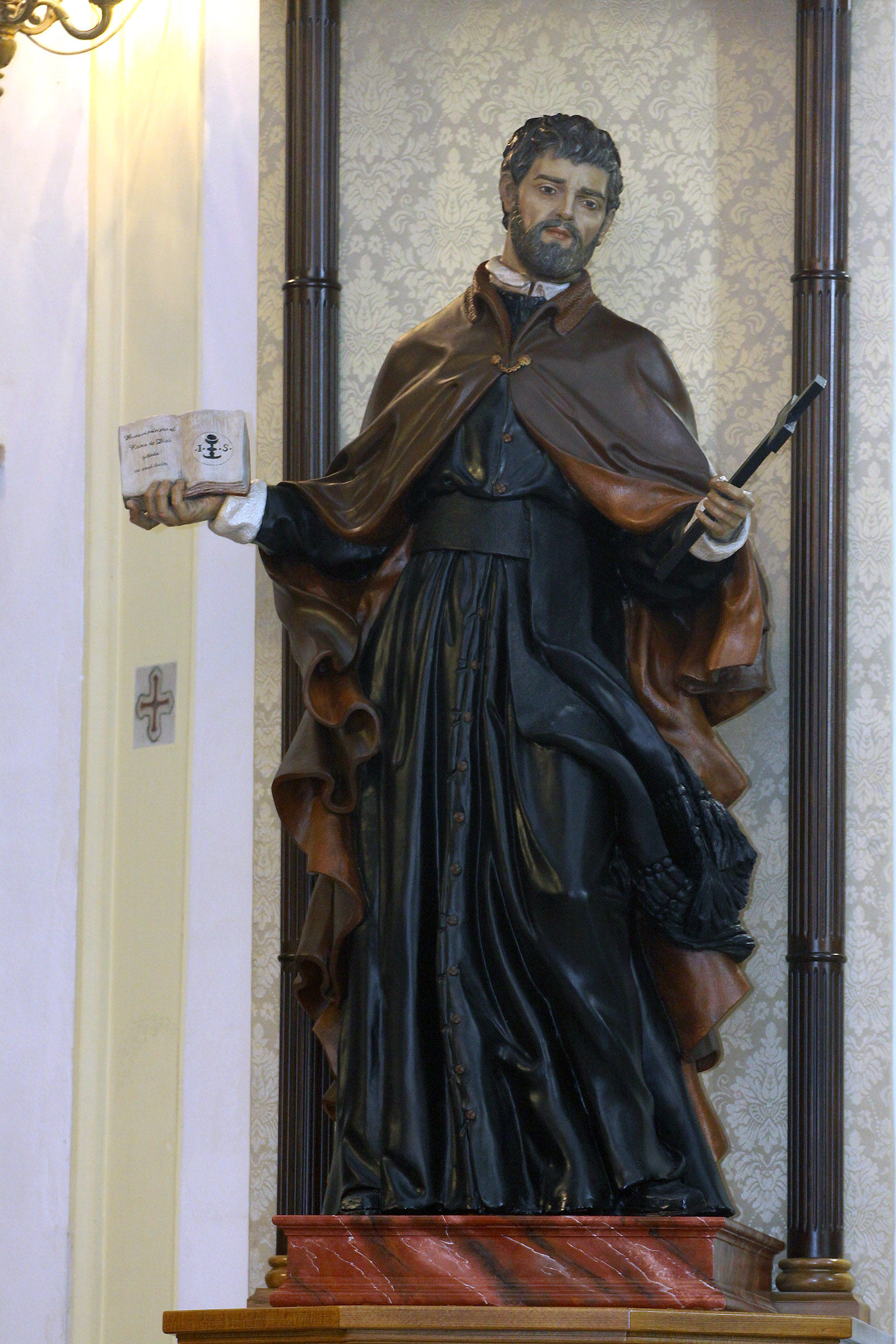 IMAGEN SAN JUAN DE AVILA SITUADA EN LA BASÍLICA MONTILLANA